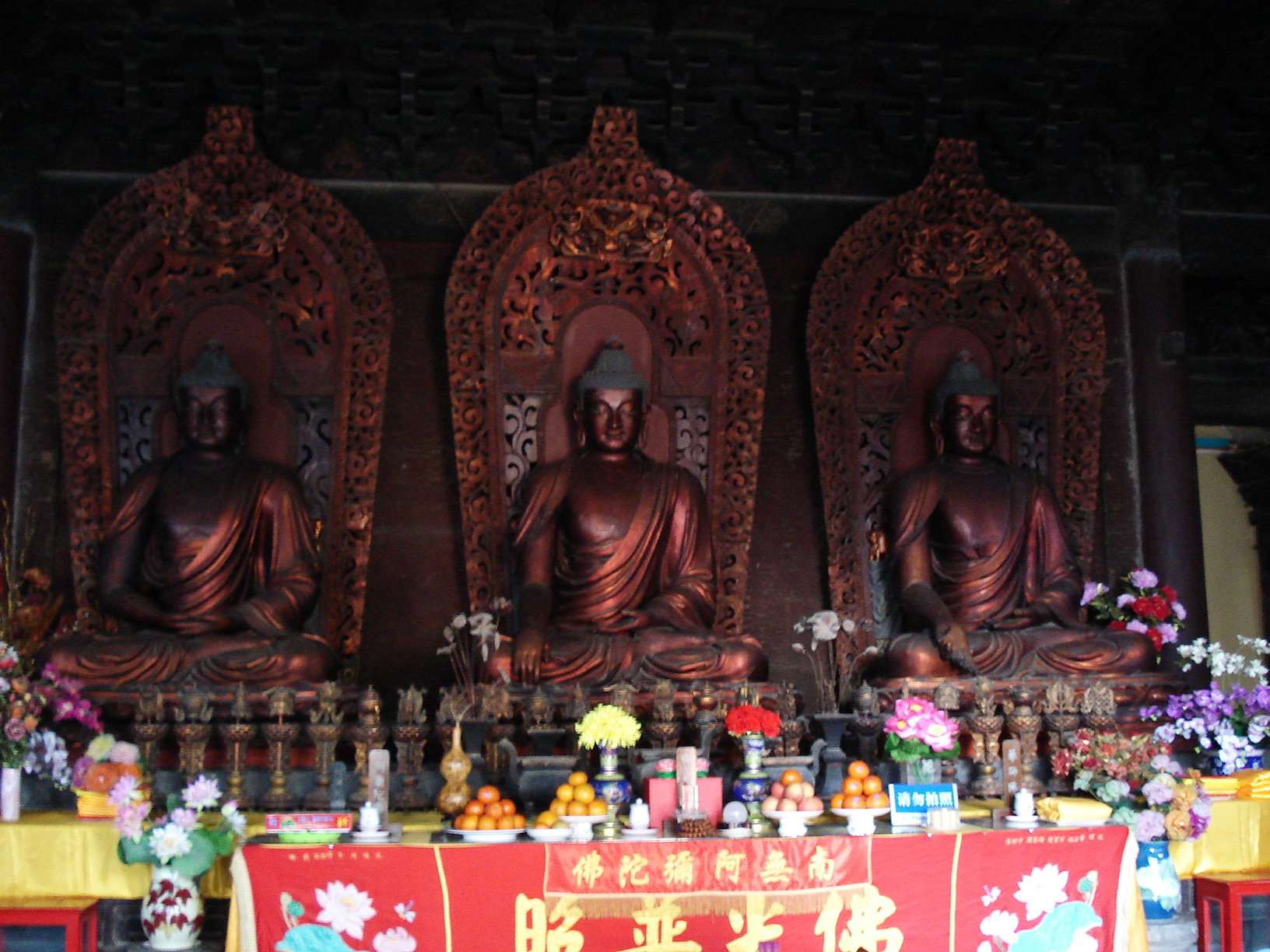 北京大觉寺大雄宝殿横三世佛。